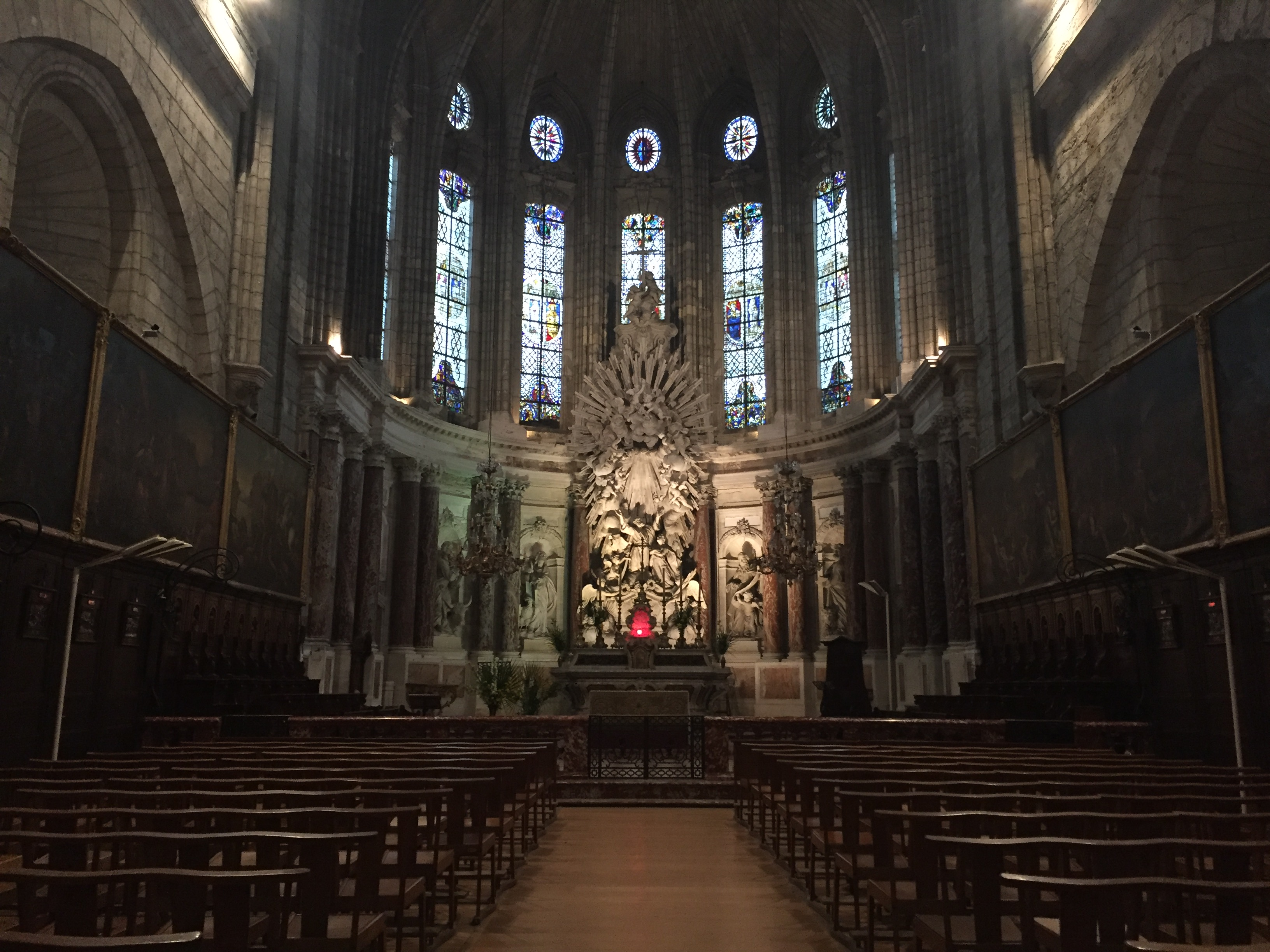 Beziers